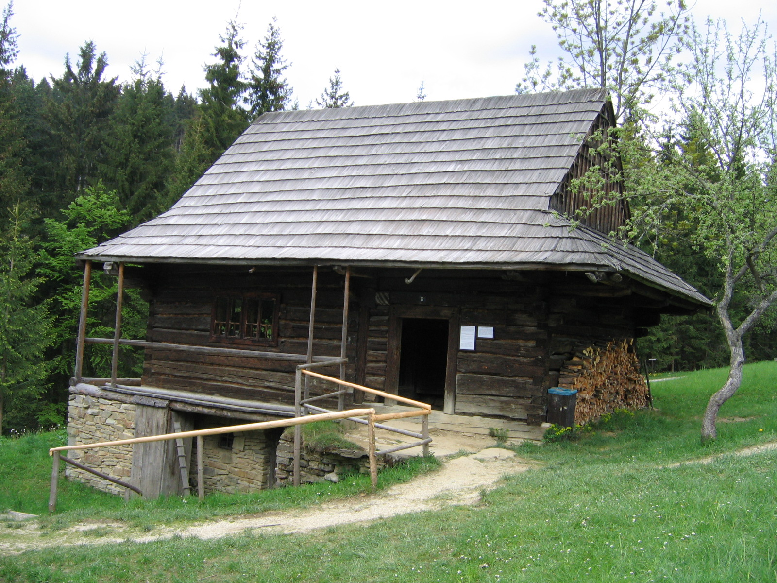 Obytná budova v Múzeu kysuckej dediny.